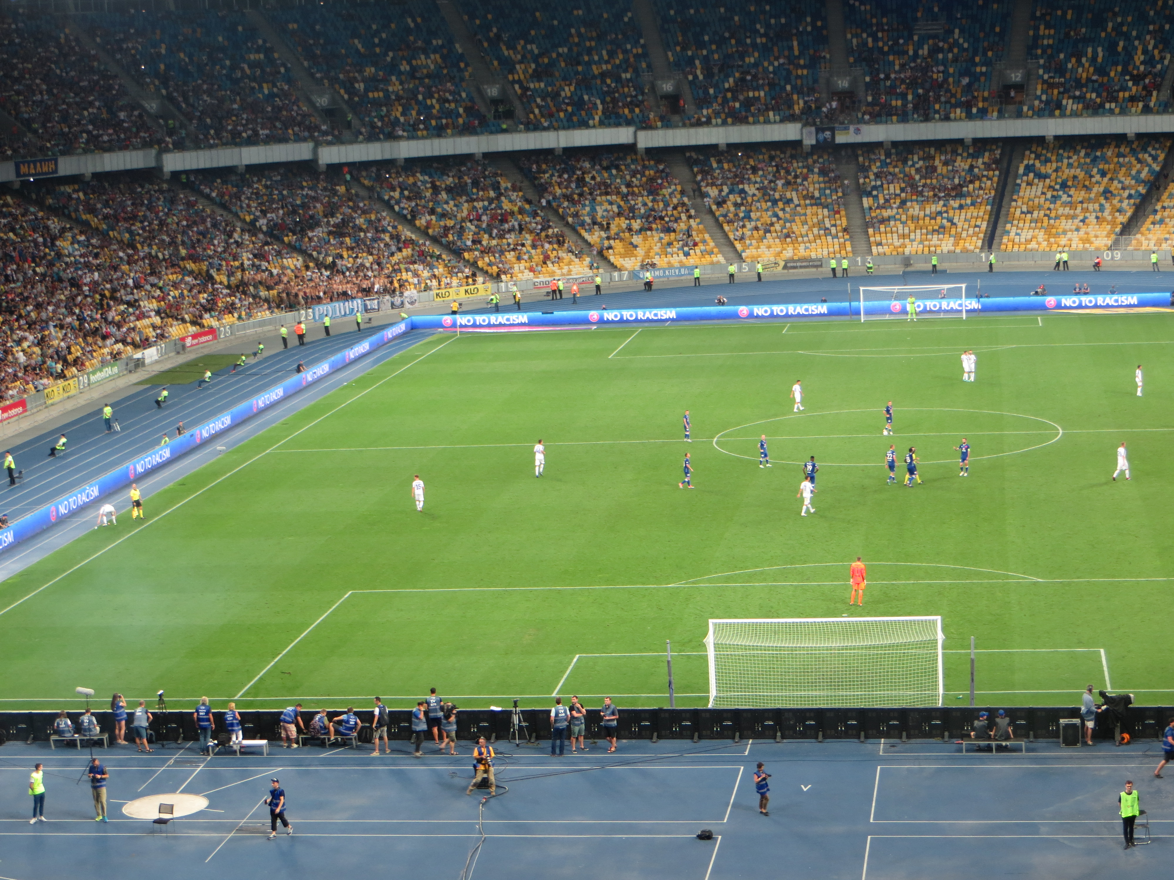 14.08.2018 Ліга чемпіонів УЄФА 2018-2019. Динамо (Київ) - Славія (Прага) 2:0